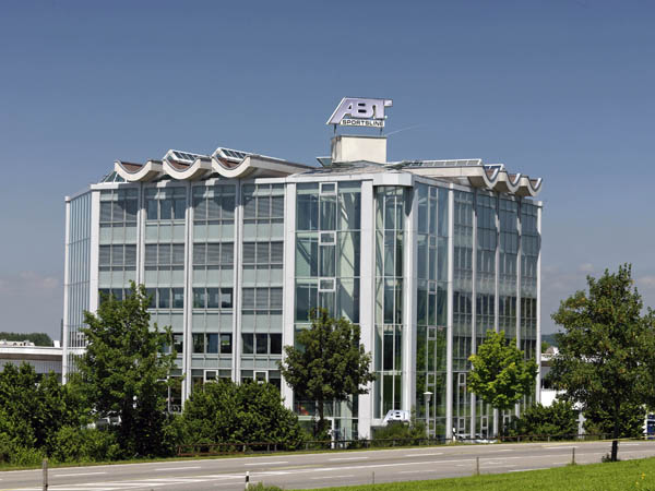 Die Abt Sportsline-Firmenzentrale in der Kemptener Daimlerstraße 2